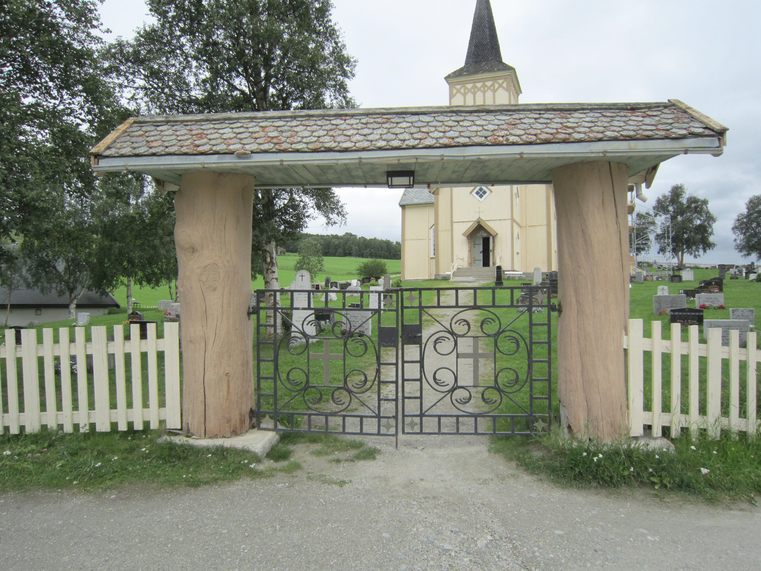 Os kirke i Østerdalen med fylkesvei 531 foran